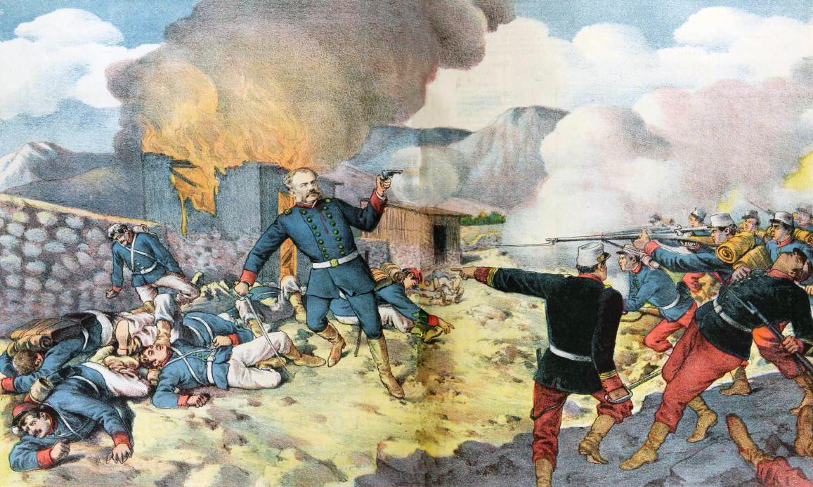 Litografia que representa la muerte de Eleuterio Ramirez